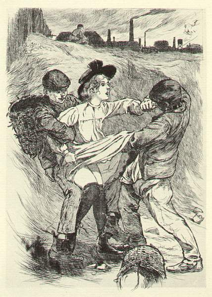 Dessins de Martin van Maele.